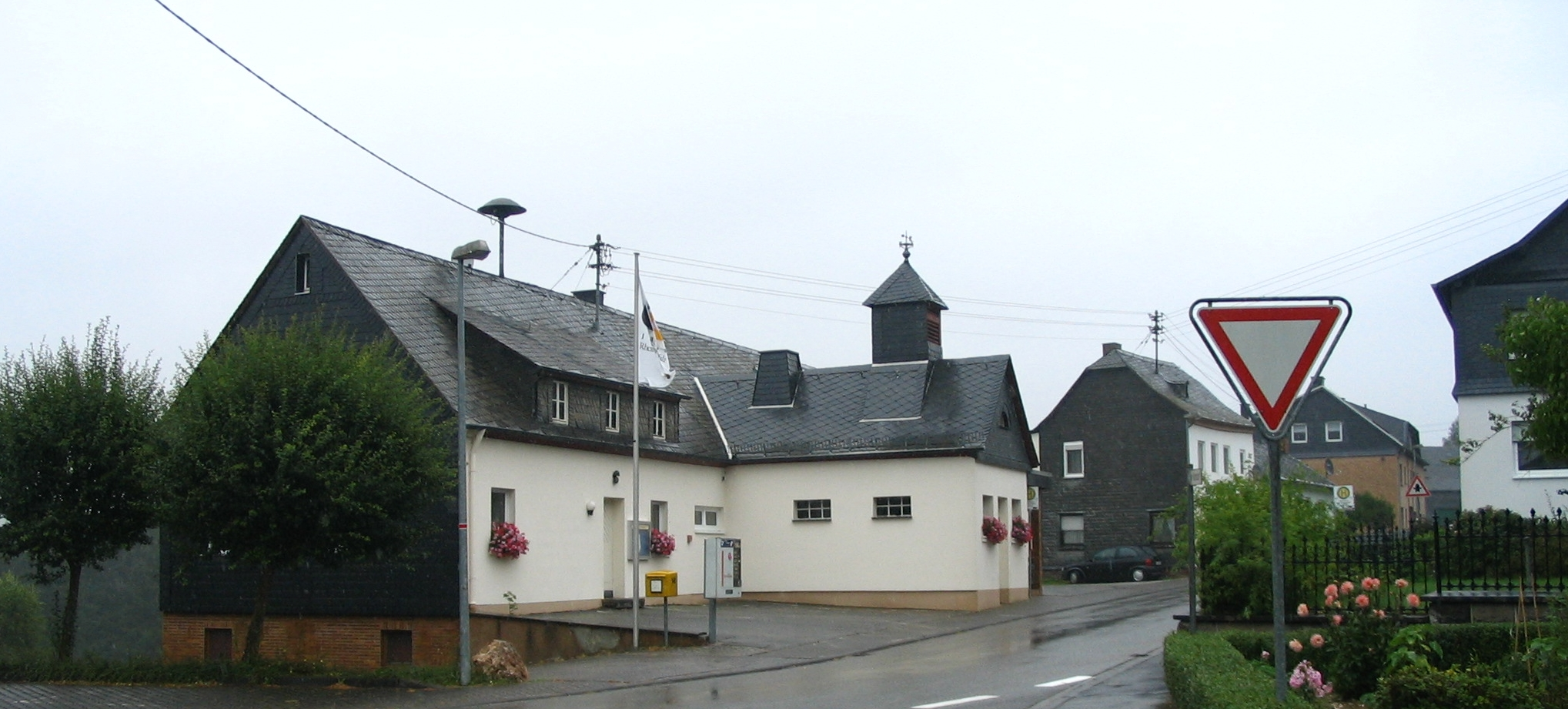 Steinbach im Hunsrück